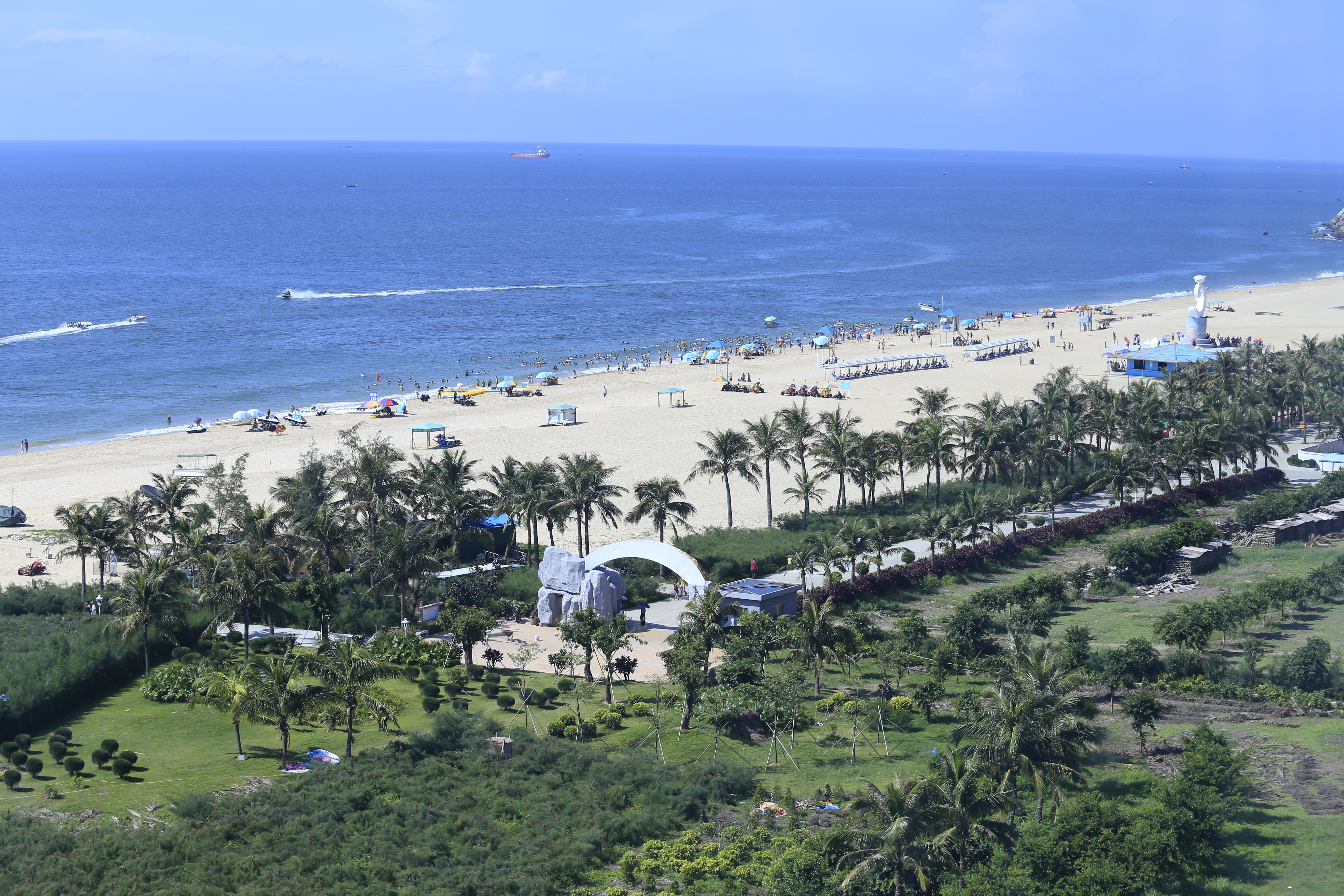 阳江海陵岛大角湾